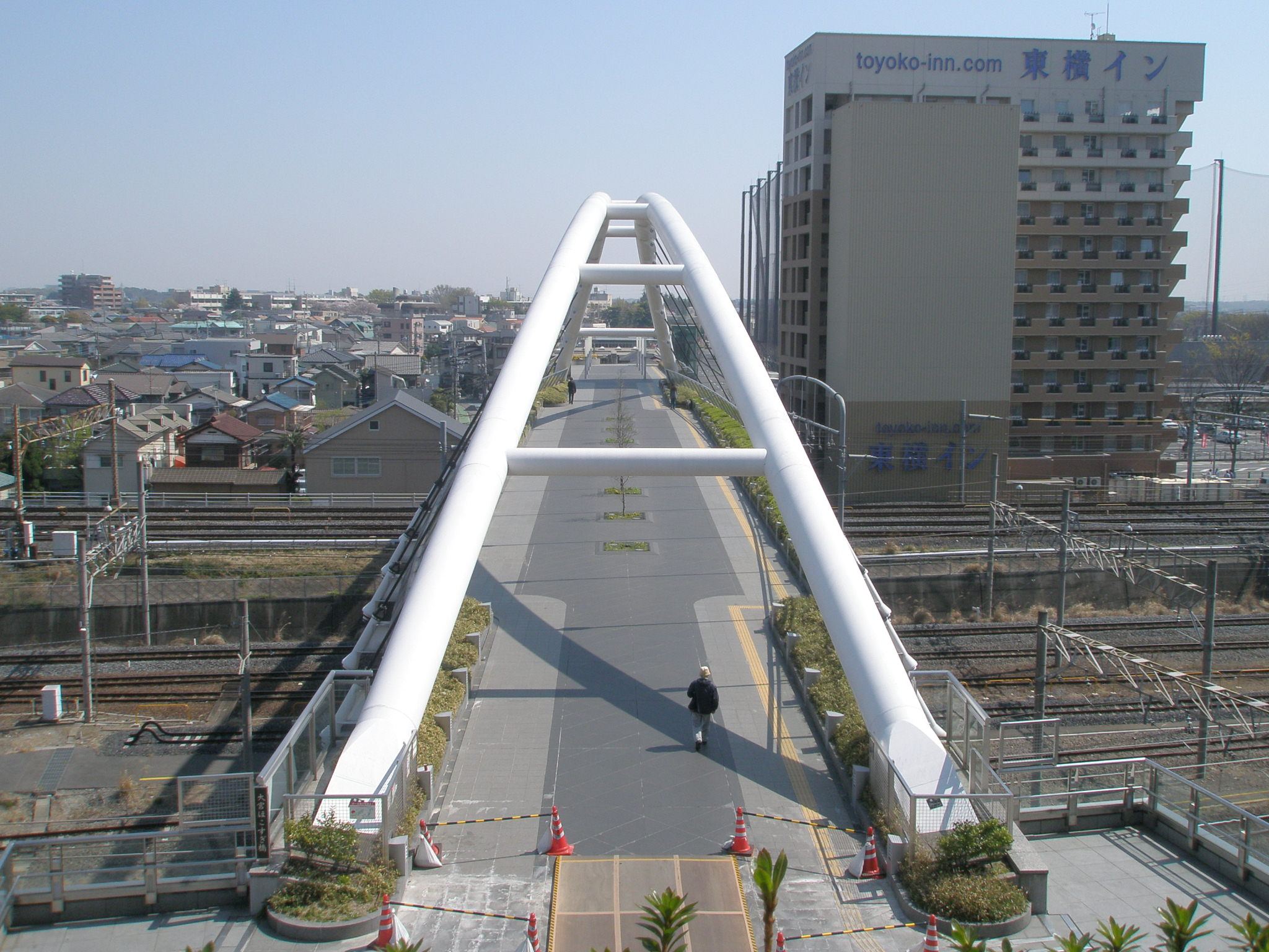 大宮ほこすぎ橋・さいたまスーパーアリーナより